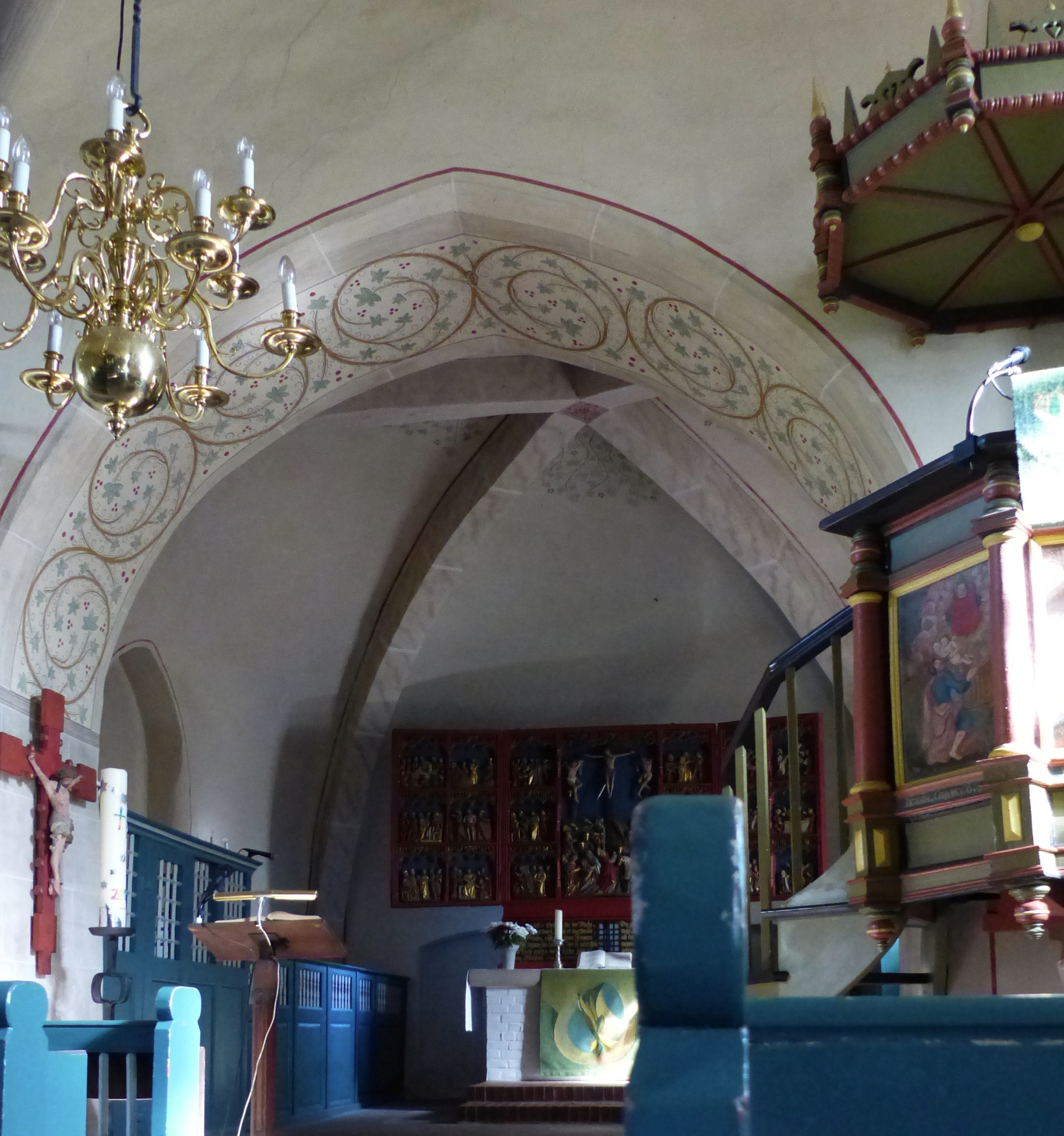 Martinskirche Schiffdorf: spitzer Triuphbogen und Chor/Presbyterium mit Domikalgewölbe